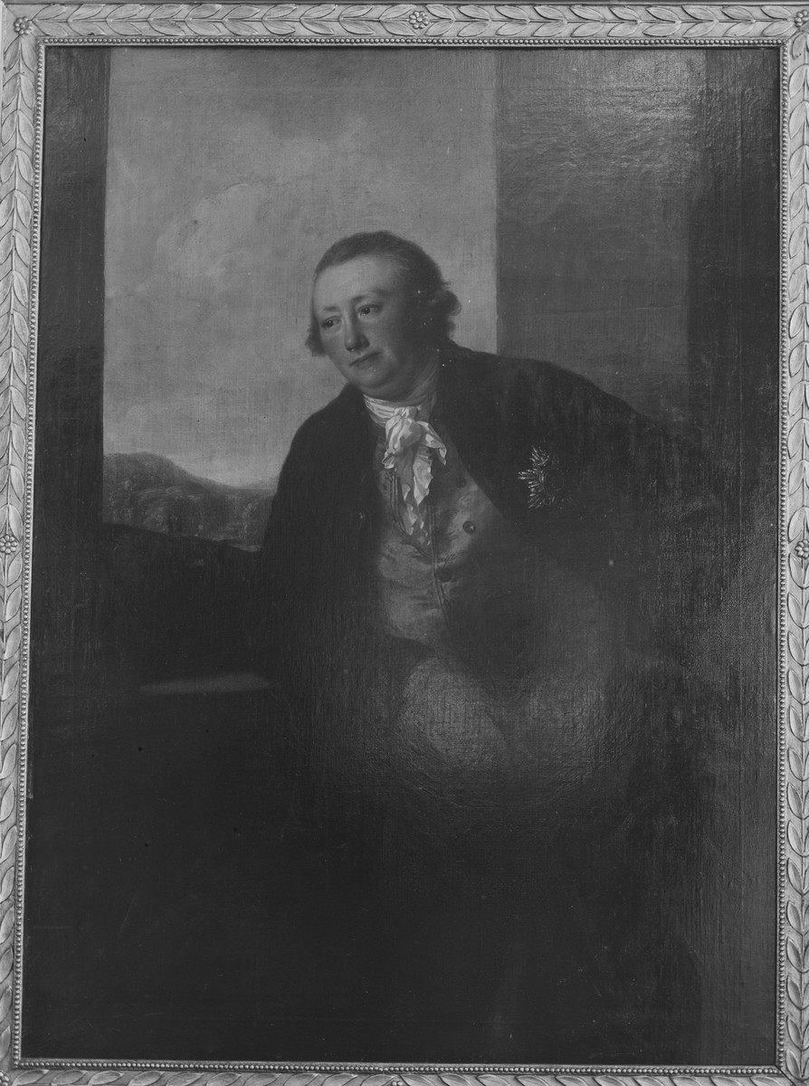 Bildnis des Fürsten Friedrich Carl August von Waldeck und Pyrmont (1743-1812)